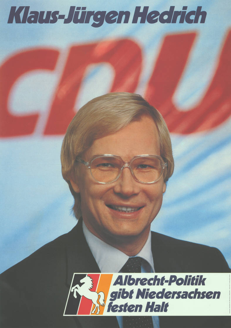 Klaus-Jürgen Hedrich CDU Albrecht-Politik gibt Niedersachsen festen Halt Abbildung: Porträtfoto - Nationalfarben mit Niedersachsenross Plakatart: Kandidaten-/Personenplakat mit Porträt Auftraggeber: Verantw.: Niedersachsen-CDU, Hannover Drucker_Druckart_Druckort: Willy F.P. Fehling GmbH, Hannover Objekt-Signatur: 10-008 : 500 Bestand: Landtagswahlplakate Niedersachsen (10-008) GliederungBestand10-18: Landtagswahlplakate Niedersachsen (10-008) » CDU Lizenz: KAS/ACDP 10-008 : 500 CC-BY-SA 3.0 DE